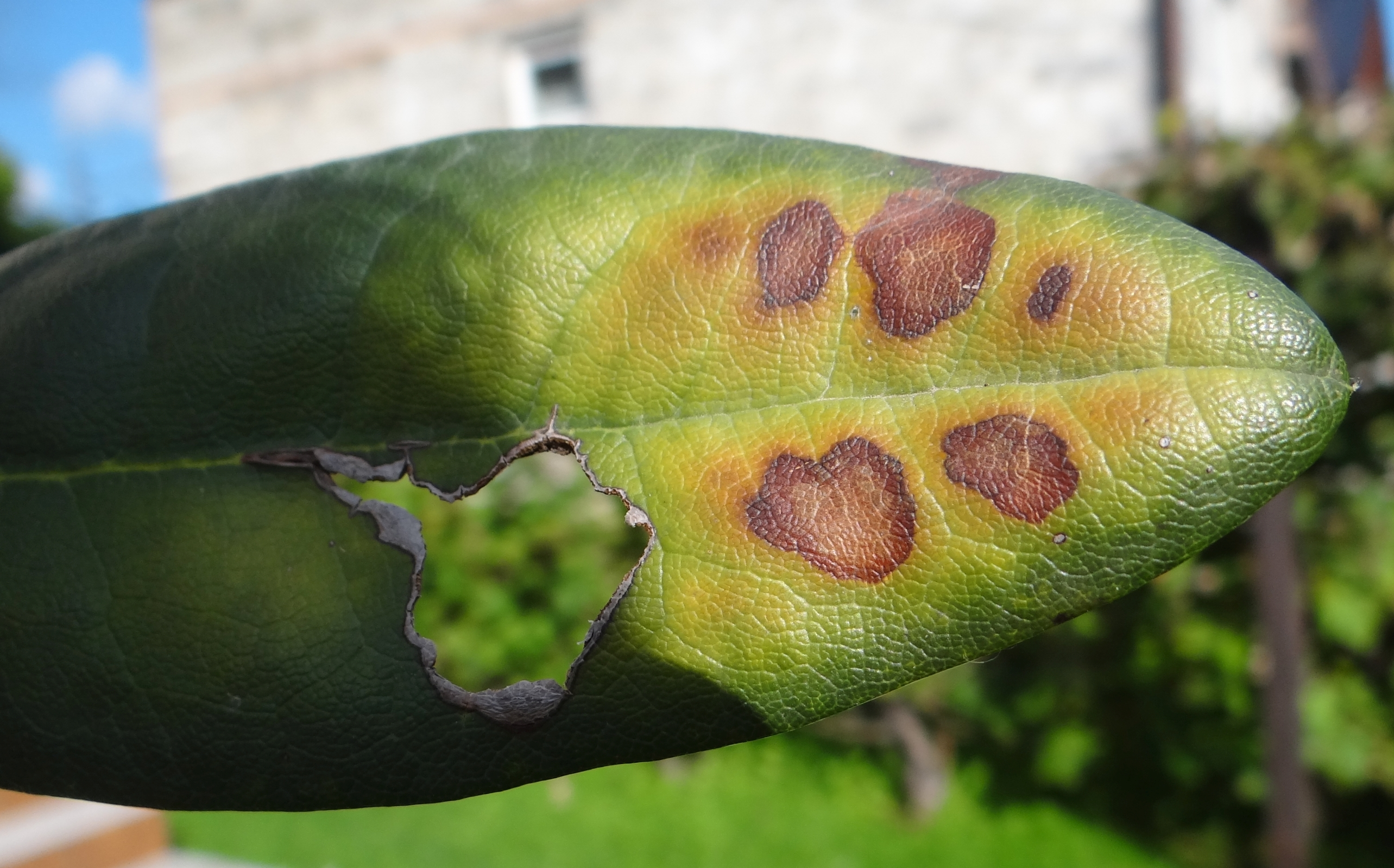 Chuppomyces handelii (synonime: Cercospora handelii) on leaf Rhododendron catawbiense. Location: Poland, Trzciana, woj. małopolskie